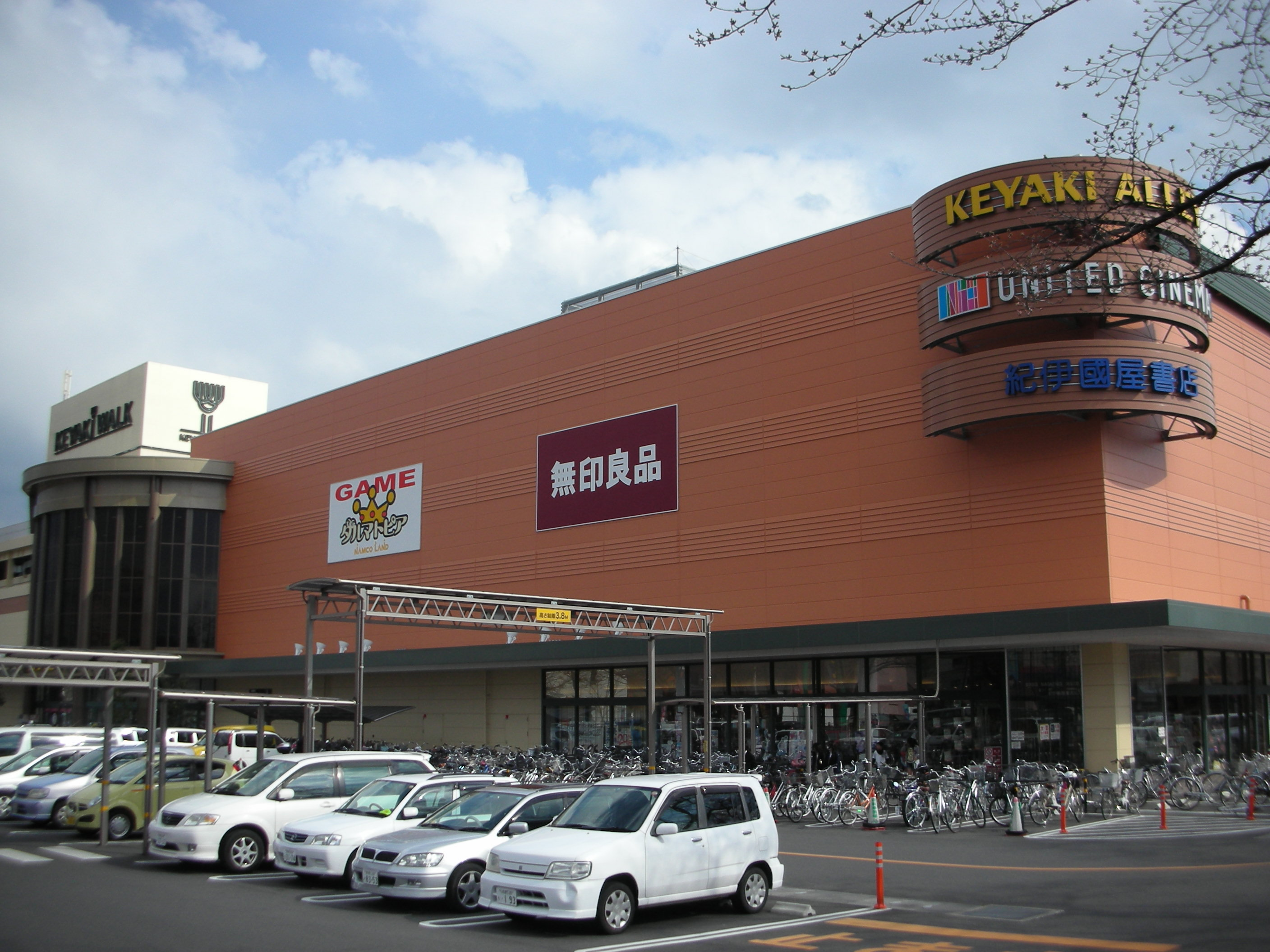 けやきウォーク前橋の外観